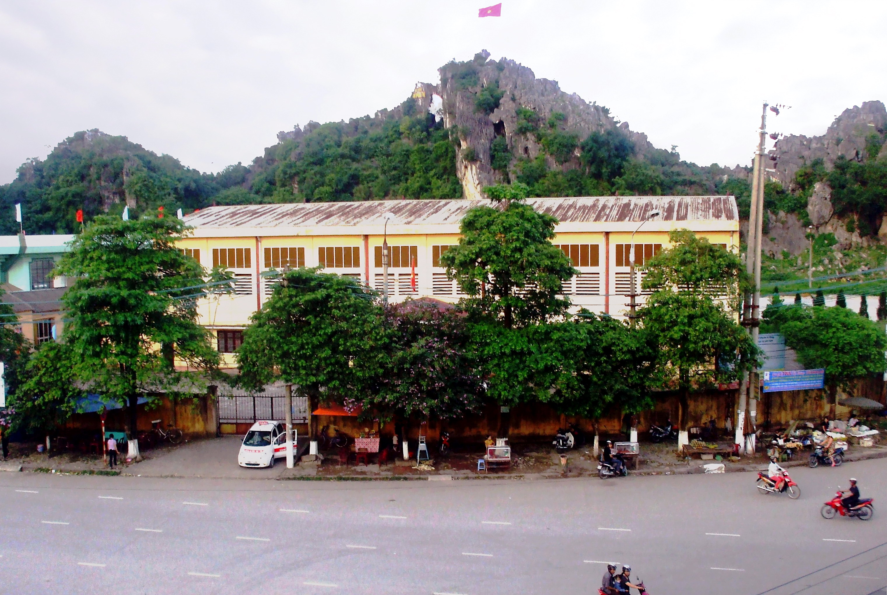 Một con đường tại trung tâm thành phố Lạng Sơn (Việt Nam). Ngọn núi trong ảnh là núi Phai Vệ hiện thuộc phường Vĩnh Trại, thành phố Lạng Sơn. Nơi đây, các nhà khảo cổ đã tìm thấy dấu vết cổ sinh vật.